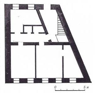 Мінск. План дома па вуліцы Інтэрнацыянальнай, 4